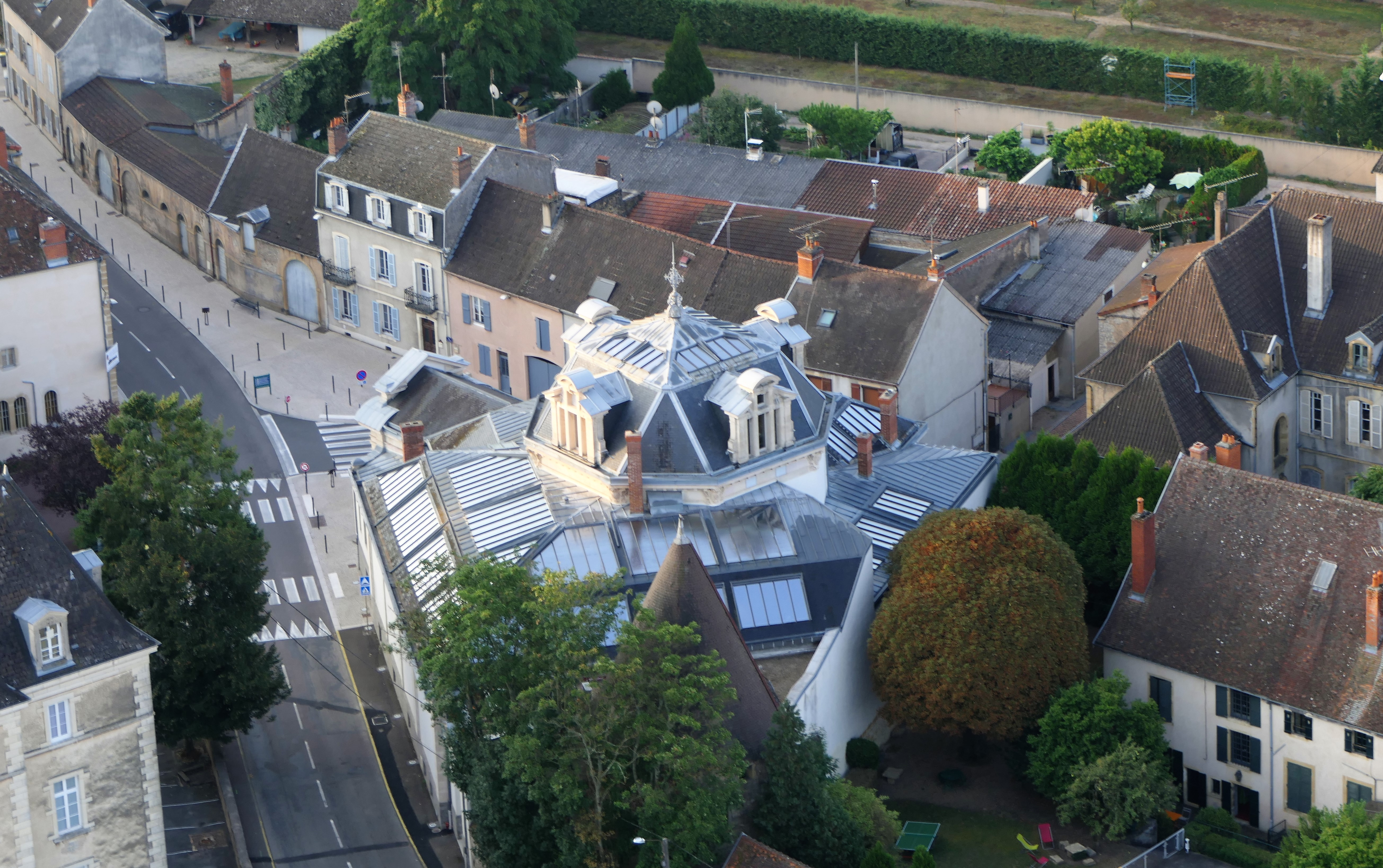 Paray-le-Monial,le musée du Hiéron, vue aérienne du bâtiment